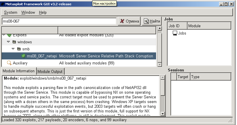 metasploit 3.2 snapshot